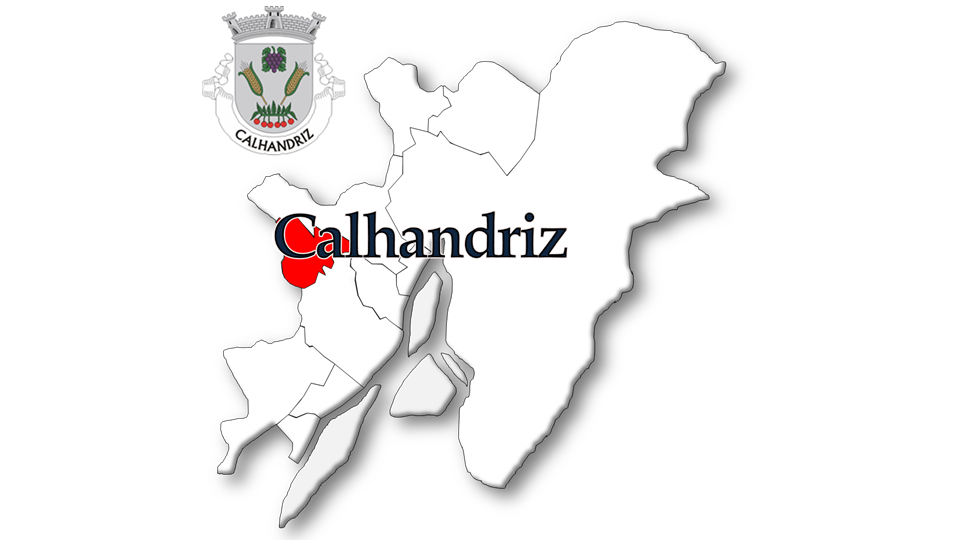 Evolução da População